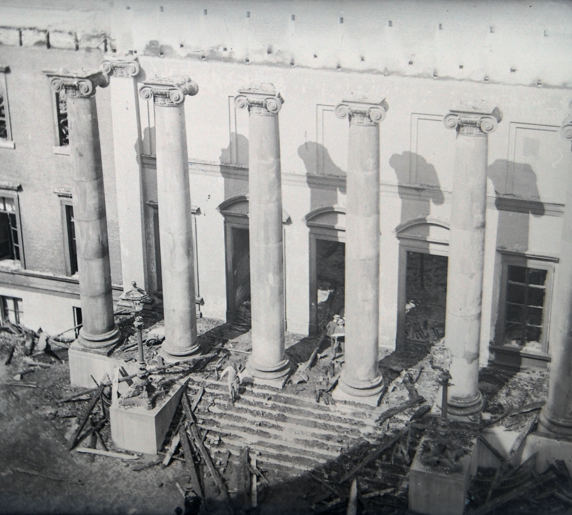 Het Academiegebouw te Groningen kort na de brand van 1906